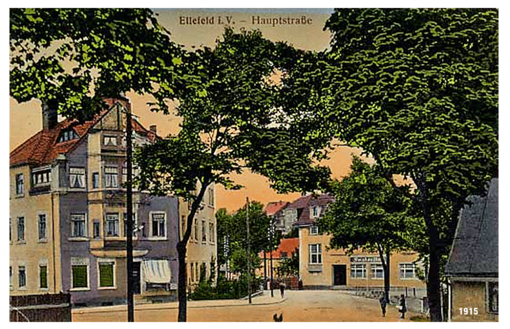 Ellefeld Vogtland 1915